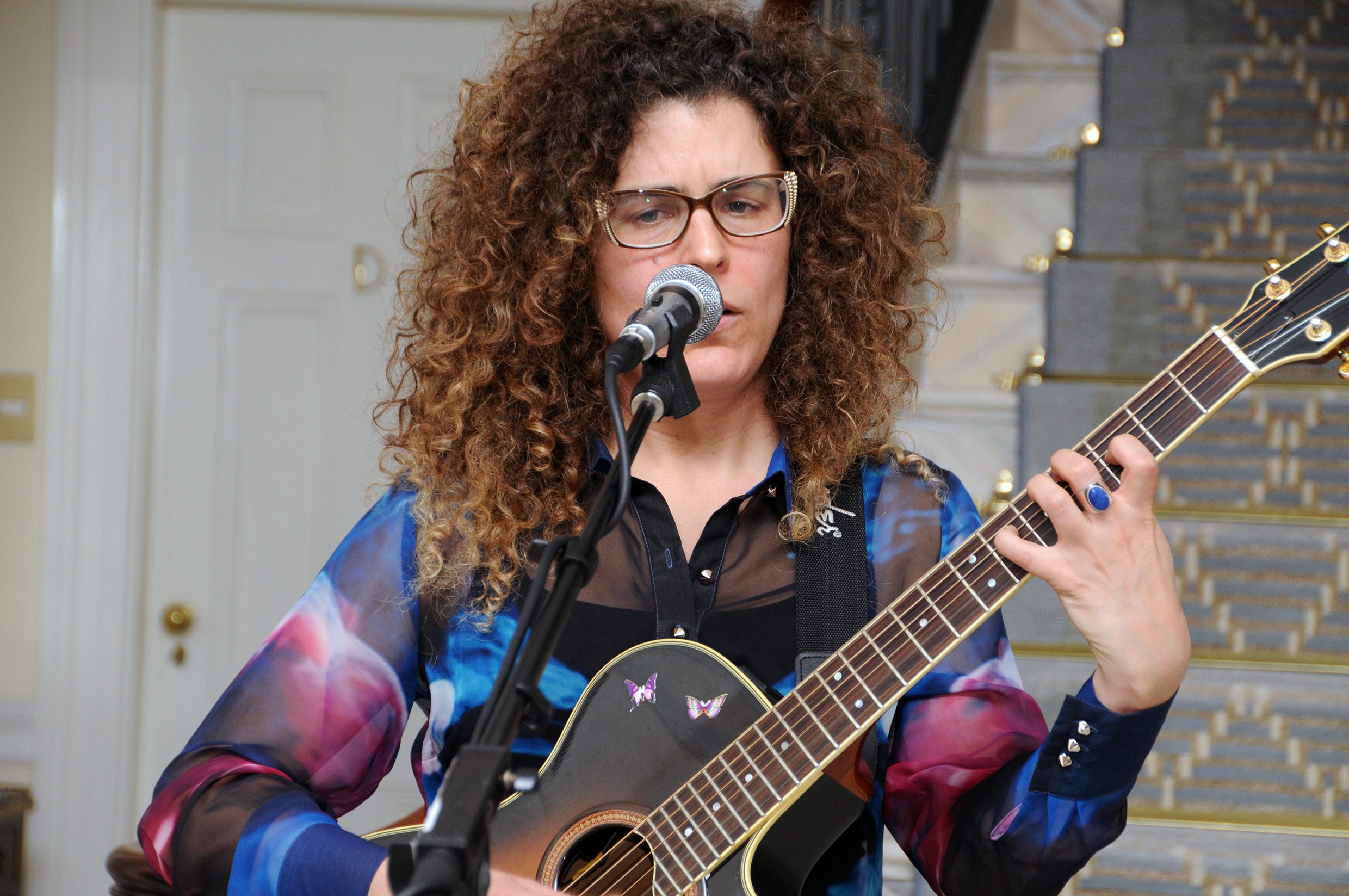 La embajadora de Estados Unidos en Uruguay, Julissa Reynoso, organizó en su residencia una degustación de estos productos para anunciar su ingreso al mercado uruguayo. El evento contó con música en vivo a cargo de Samantha Navarro. [U.S. Embassy photo: Juan Francisco Casal / Copyright info] Artículo completo en goo.gl/cqWOl0